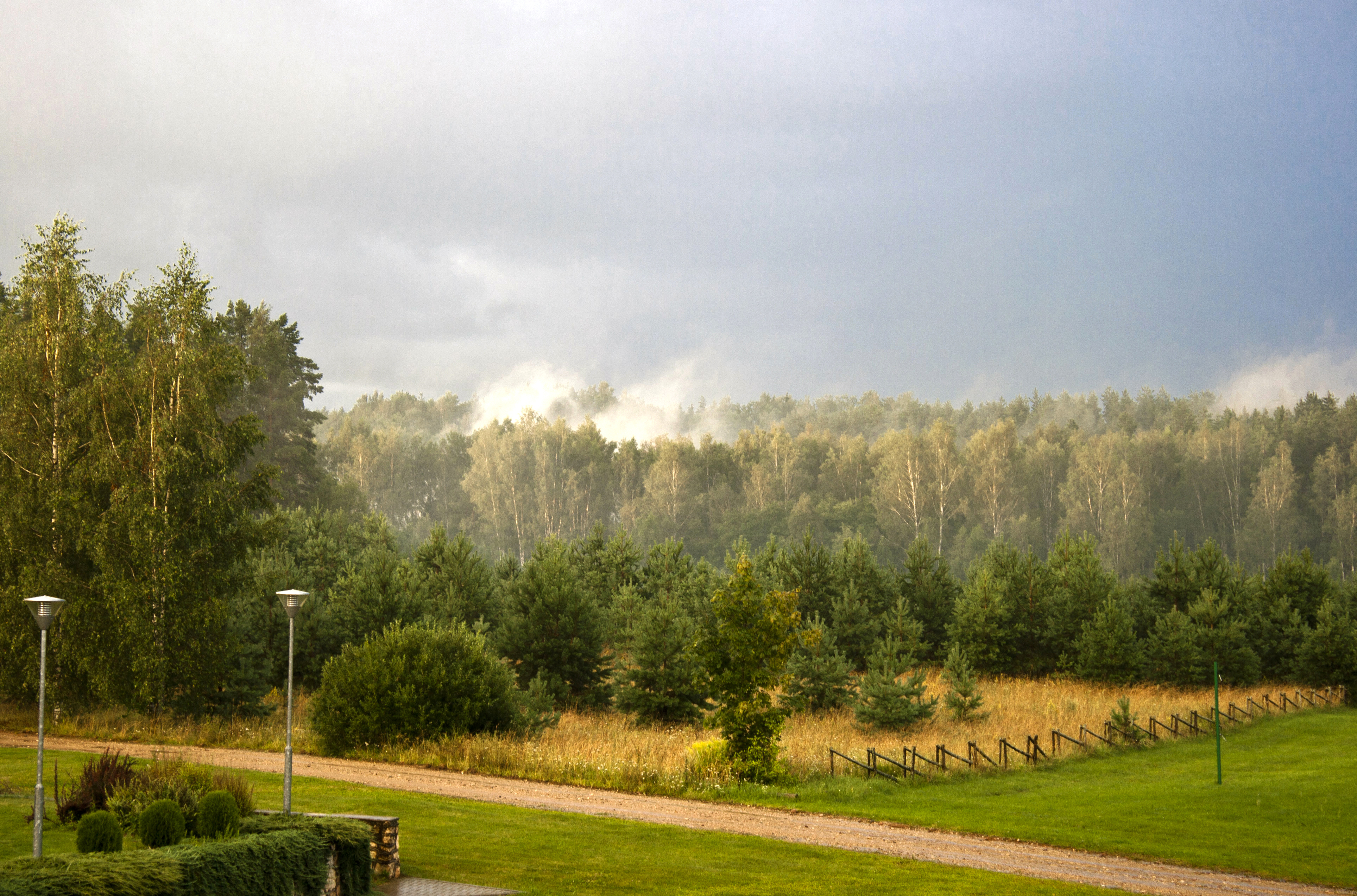 pie Smeceres kroga